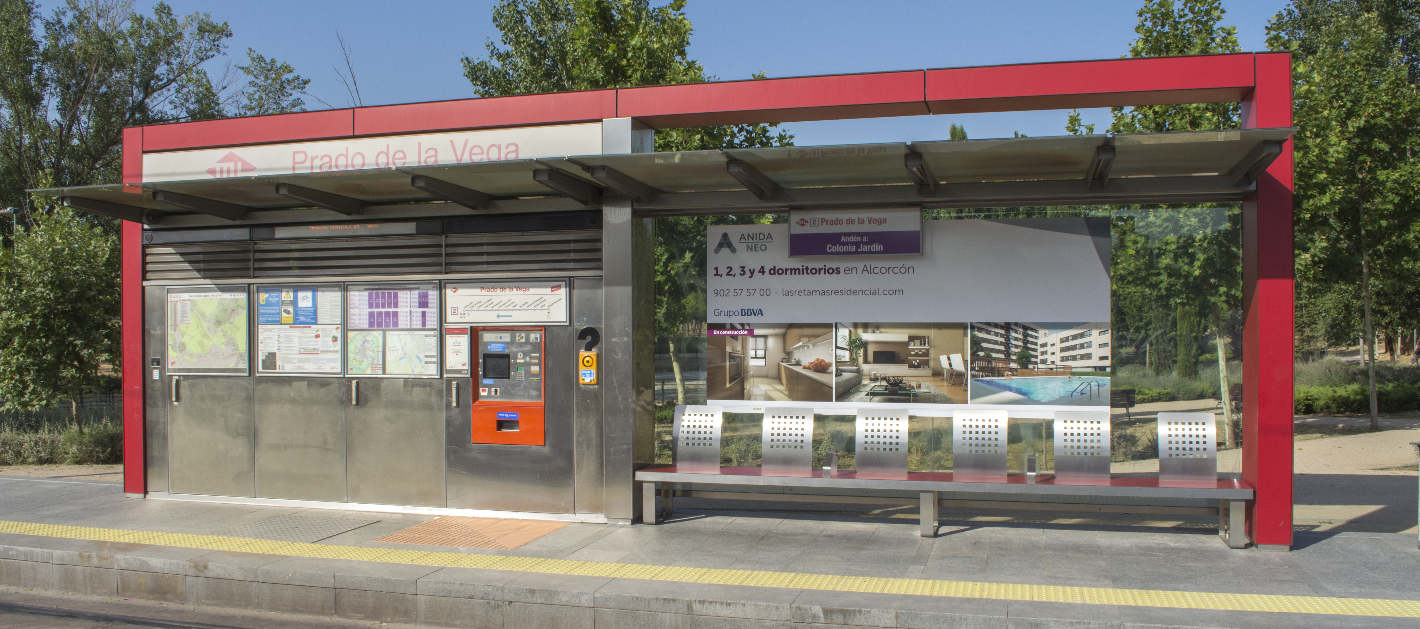 Andén de la estación Prado de la Vega, de Metro Ligero Madrid, en dirección Colonia Jardín.